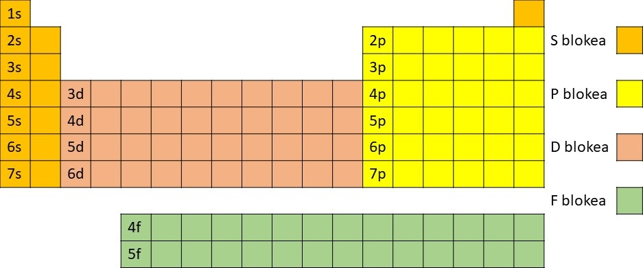 Taula periodikoko blokeak non doazen koloreekin adierazten du.